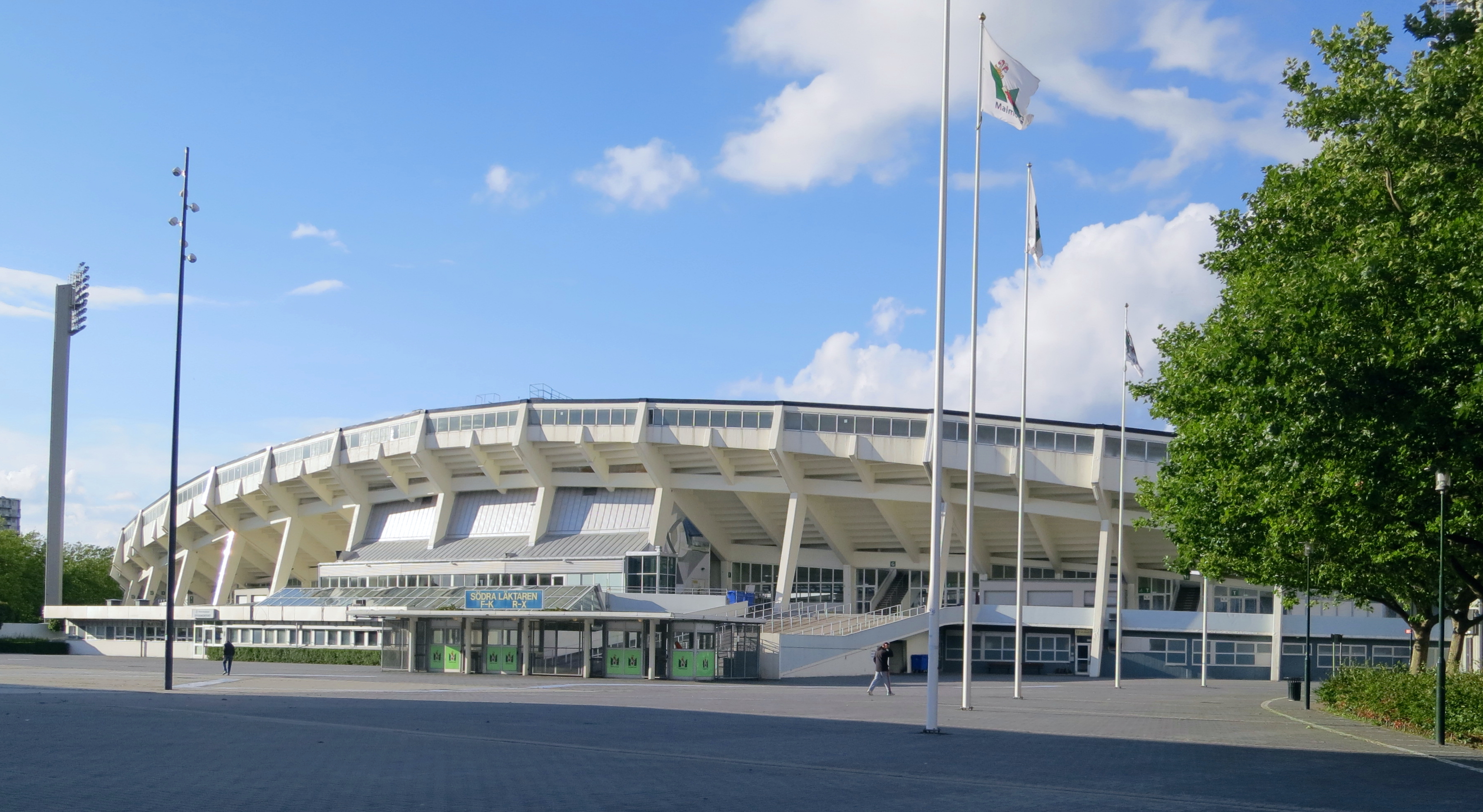 Malmö stadion 2014